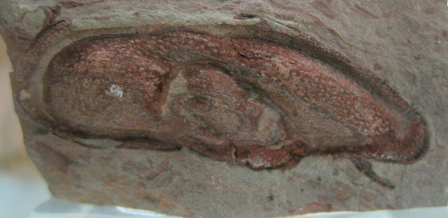 Cefalón de Conocoryphe heberti . Trilobites del Cámbrico medio de Murero (Zaragoza, España). Ejemplar del Museo Geominero de Madrid.